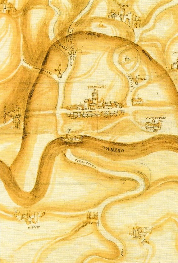 Il paese di Felizzano in una carta del XVII secolo.